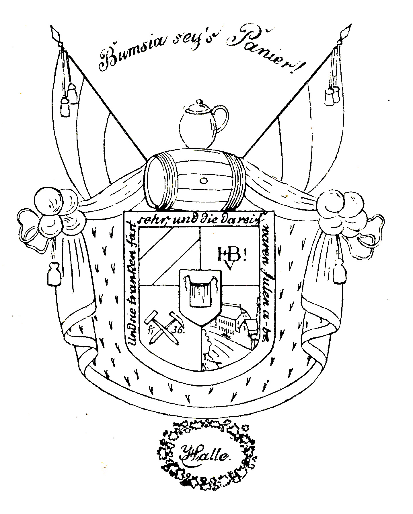 Wappen der Bumsia, Bierstaat der Saxonia Halle. Zeichnung nach einem Pfeifenkopf, der dem Corps Saxonia Frankfurt zum 15. Stiftungsfest geschenkt wurde und heute verschollen ist.